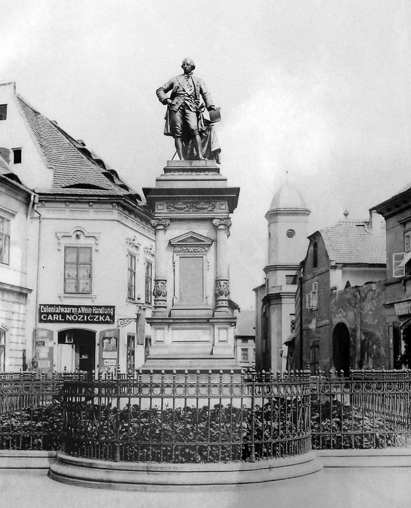 Das ehem. Kaiser-Josef II.-Denkmal am Ringplatz von Saaz (Žatec) mit dem Wahlspruch: „Dem Freunde des Volkes Kaiser Josef II.“ - Entworfen von J. Petrovsky, Architekt Saaz. Erbauer: U. Seiche, Teplitz und D. Schwarzbach, Saaz, errichtet 1882, entfernt 1919.